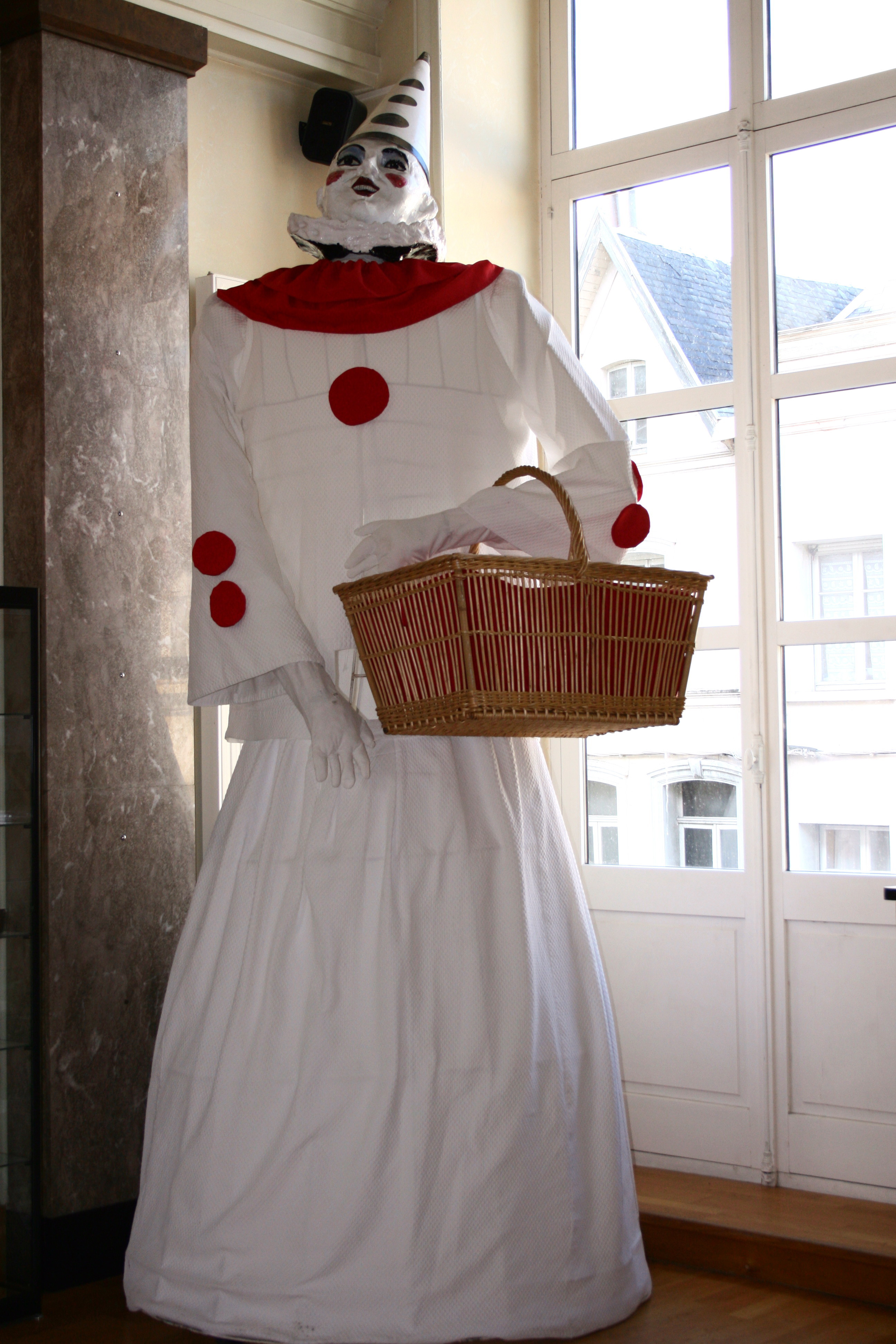 Le Quesnoy, département du Nord (France). Un des deux Géants de la ville ; Pierre Bimberlot, créé en 1904, conservé au premier étage de l'Hôtel de Ville